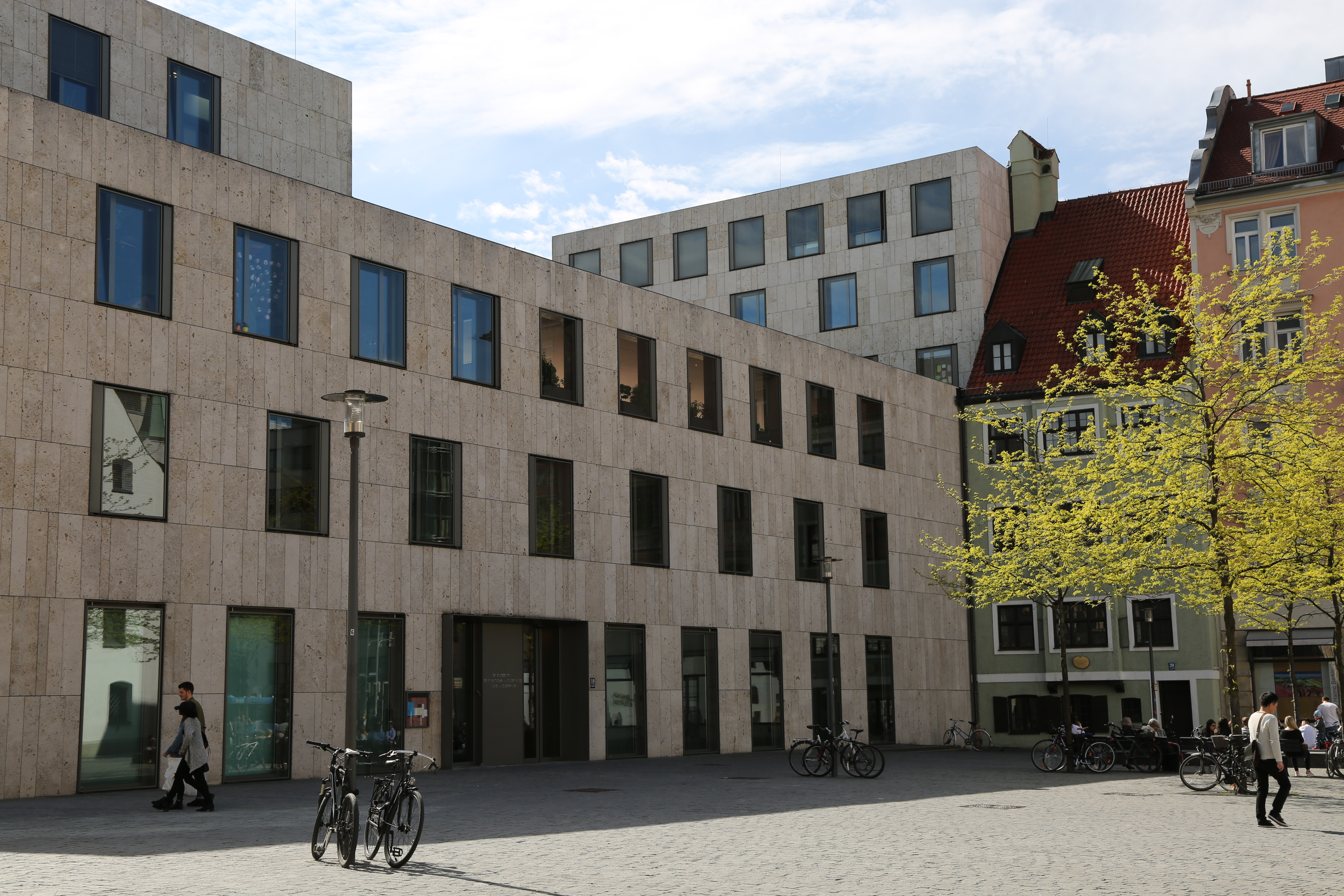 Gemeindezentrum der Isrealitischen Kultusgemeinde für München und Oberbayern. Jakobsplatz, München